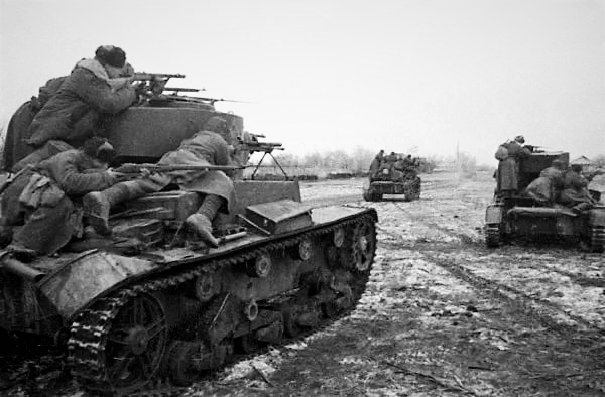 Танковый десант занимает населённый пунки Хазнидон